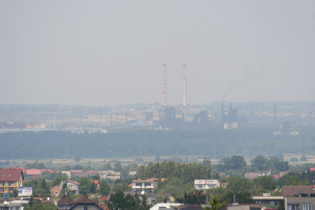 Nowa Huta- widok z Pogórza Wielickiego. Autor- Marek Czerwiński.